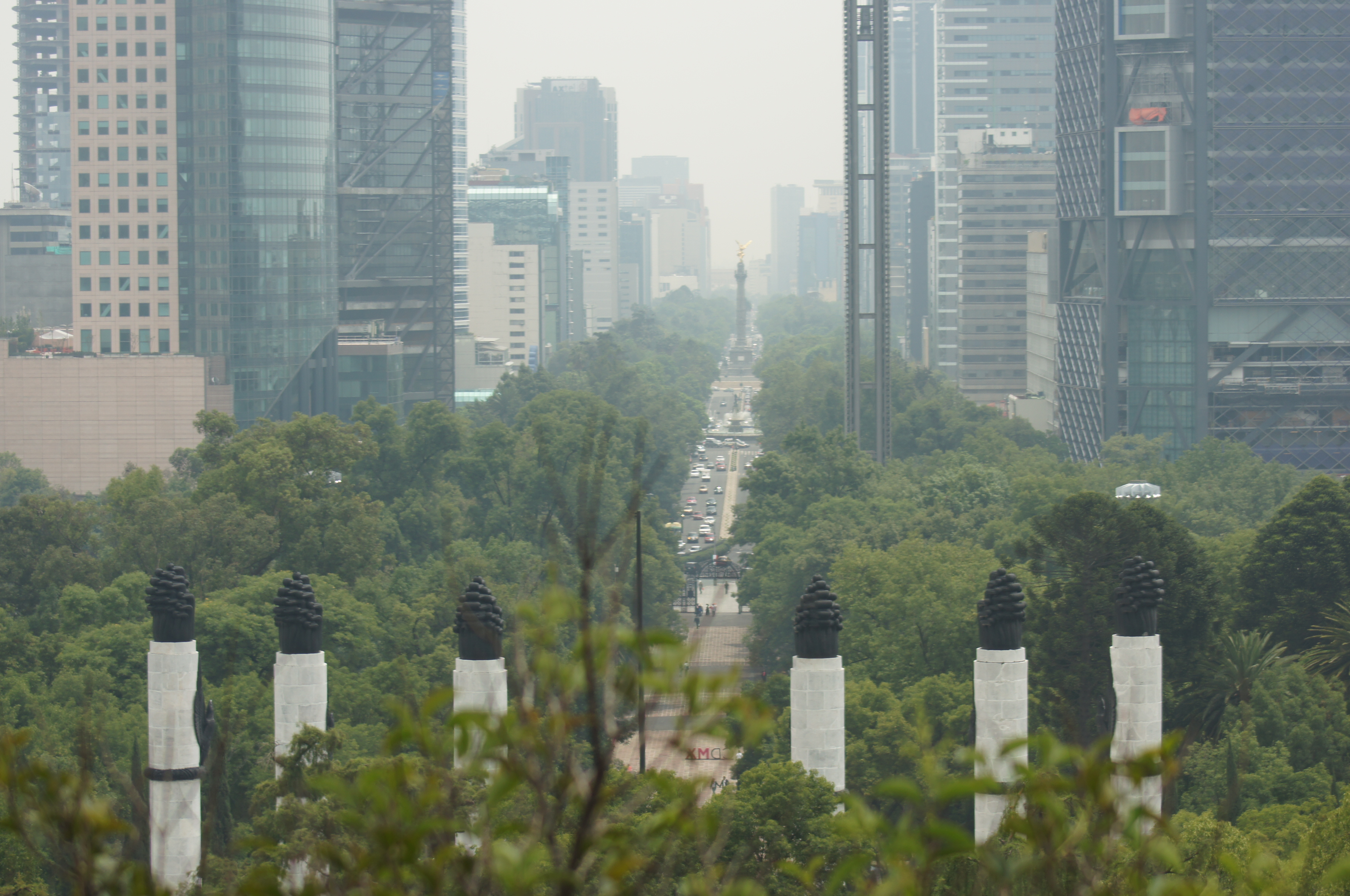 Foto de Paseo de Reforma tomada desde el Castillo de Chapultepec.